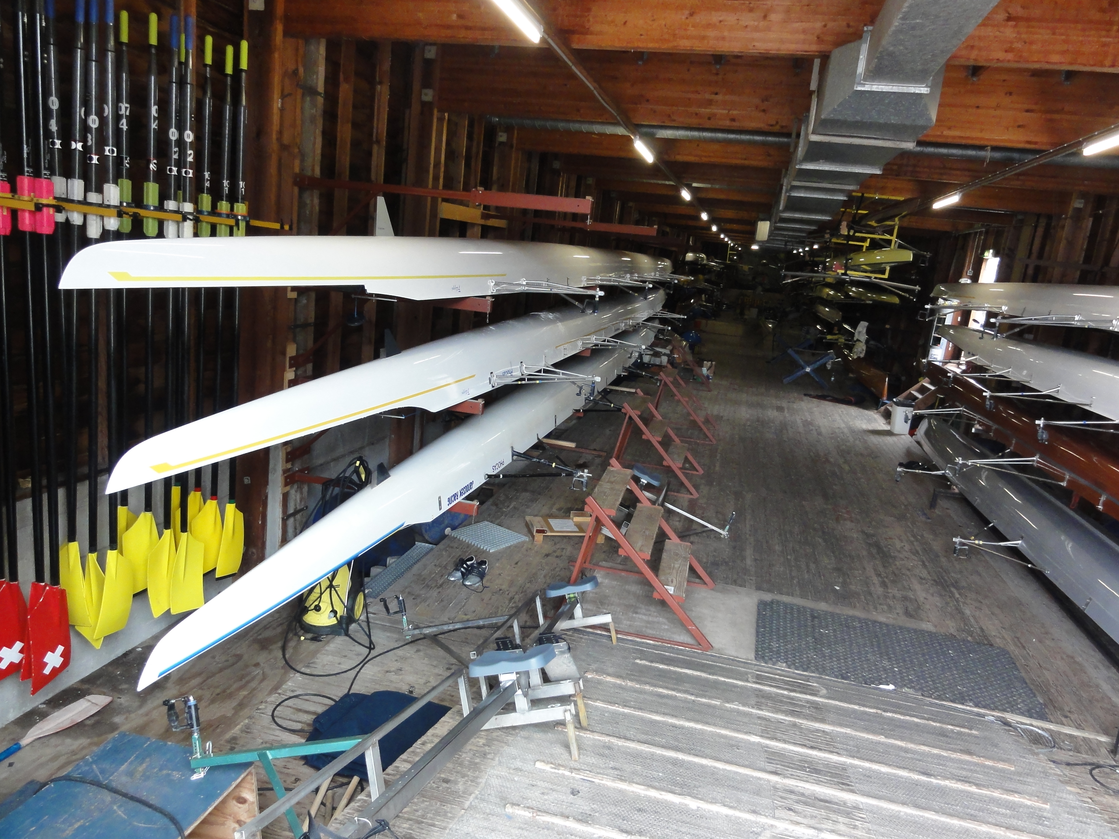 Nijmegen, boten in botenhuis roeivereniging Phocas